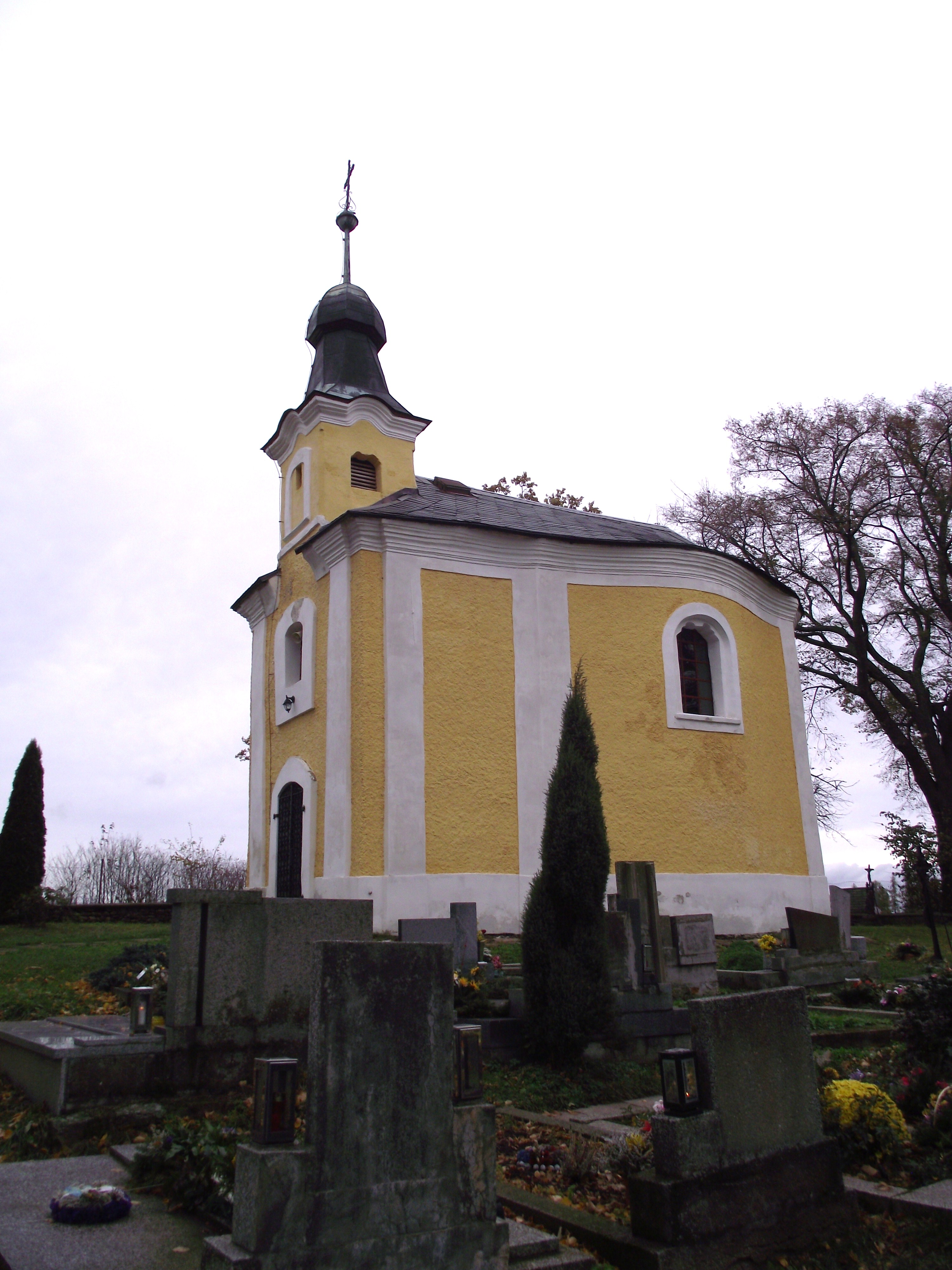 Kaple sv. Anny (Vyklantice), Pelhřimov